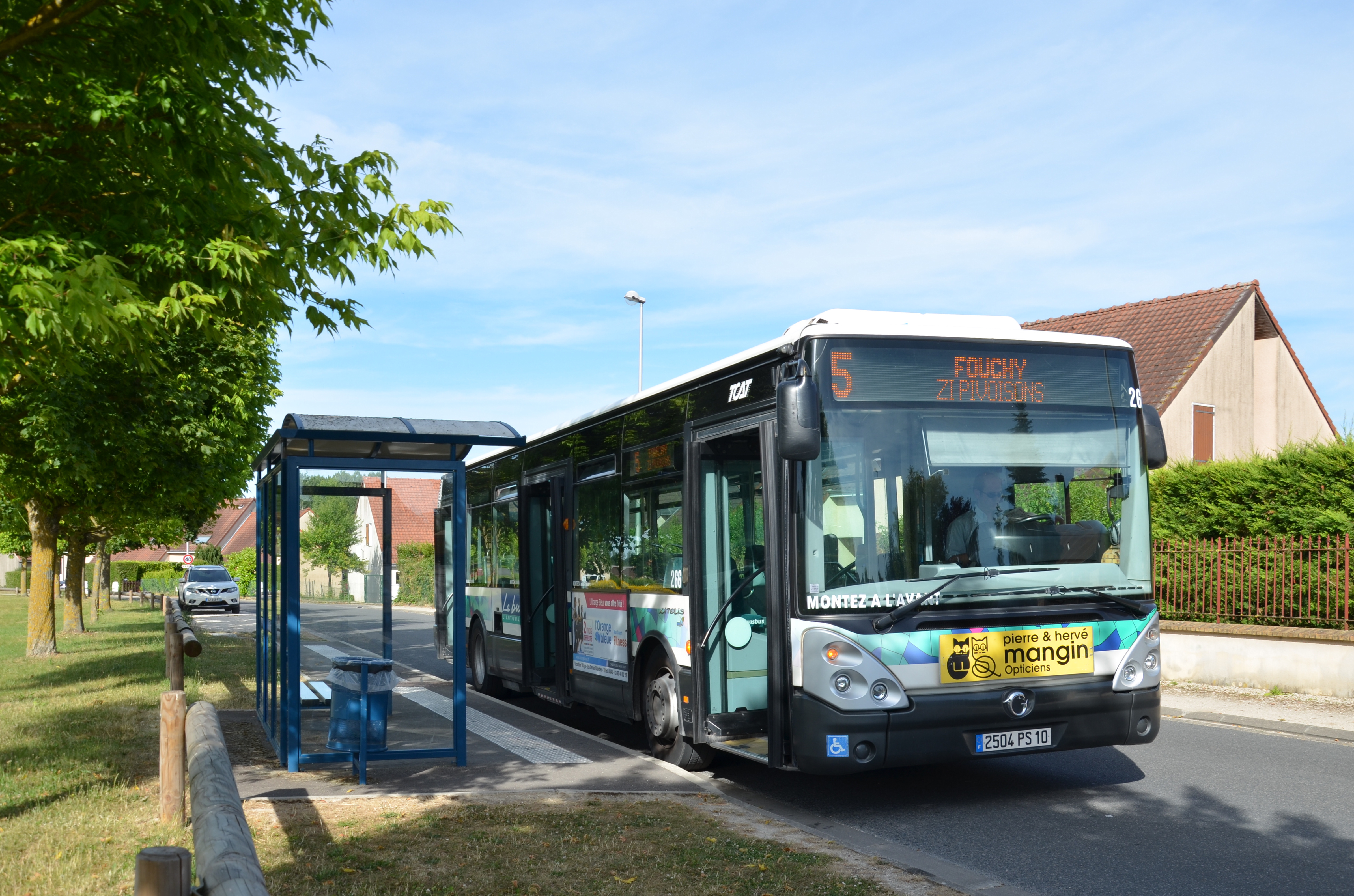 Irisbus Citelis 12 n°262 sur la ligne 5 du réseau TCAT de Troyes, à son terminus Saint Germain - Courcelles.